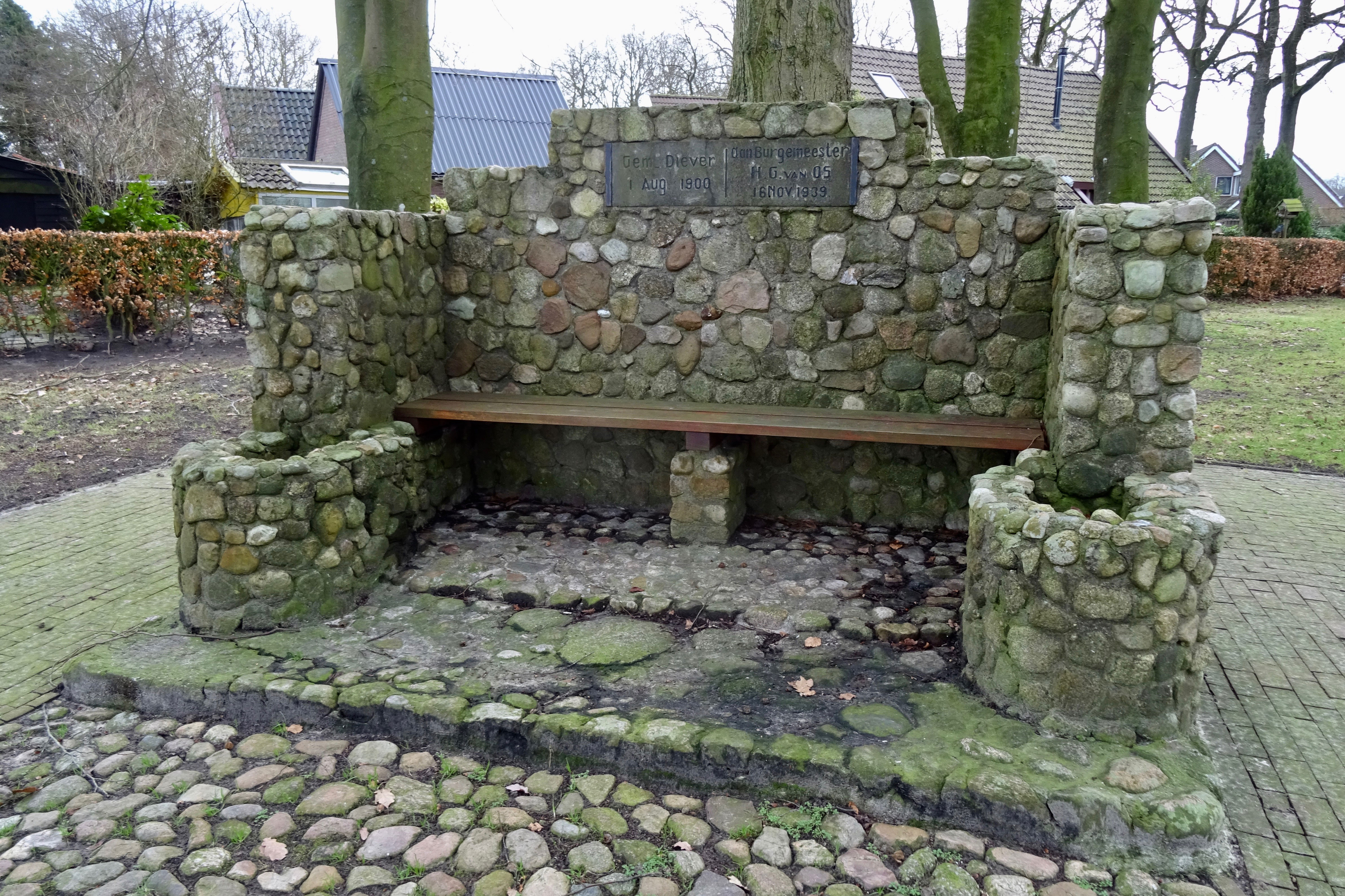 Herdenkingsbank burgemeester H.G. van Os in Diever